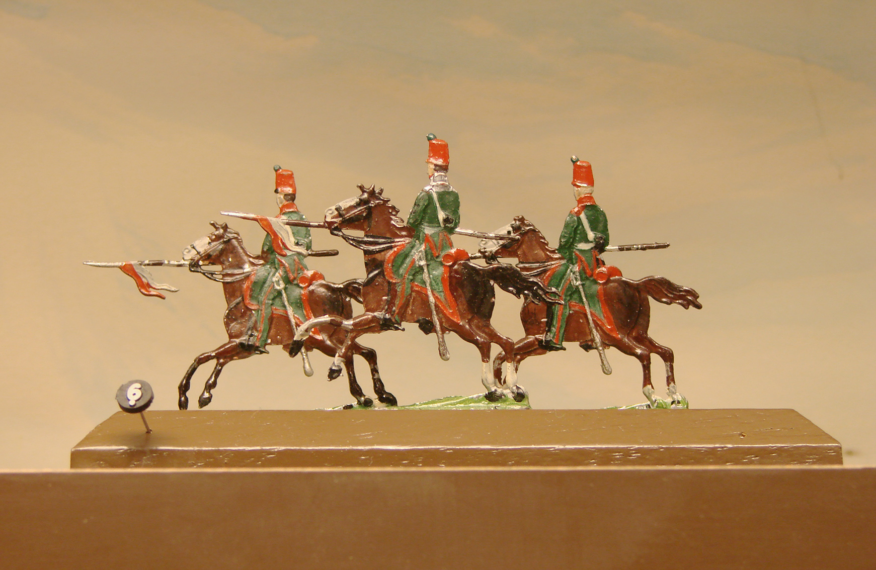 Plats d'étain: éclaireurs de la Garde Impériale (1813-1815).Modèle de Heinrichsen, 1880-1890.Musée de la Figurine historique à Compiègne.